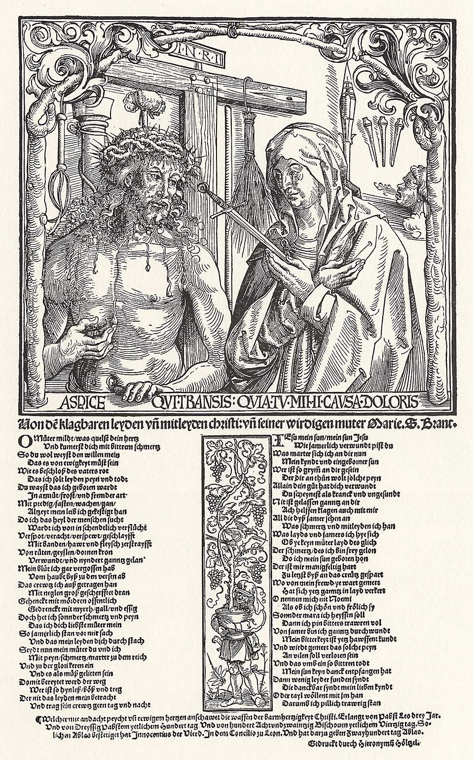 Holzschnitt von Traut Wolf, um 1515, Albertina, Wien.